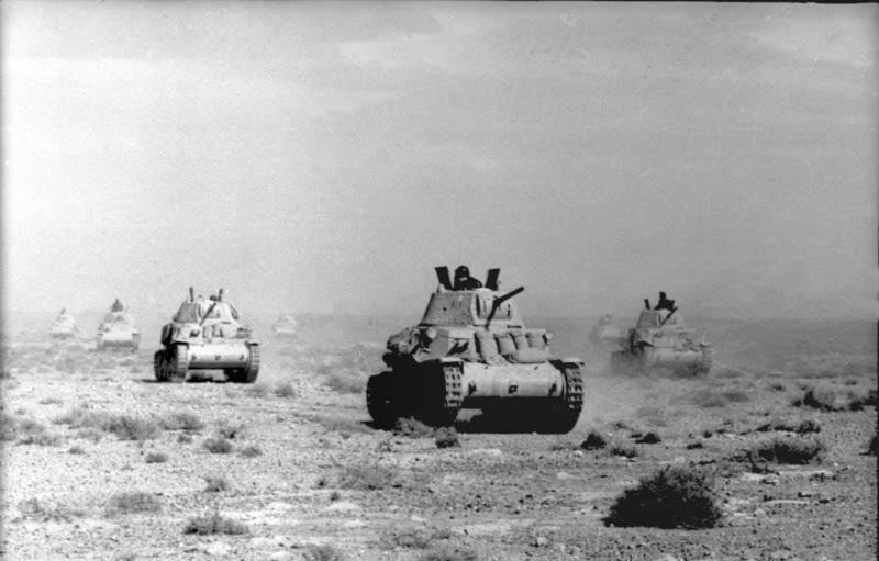 carri armati italiani del Regio Esercito (modello M13/40) di guardia nel deserto africano